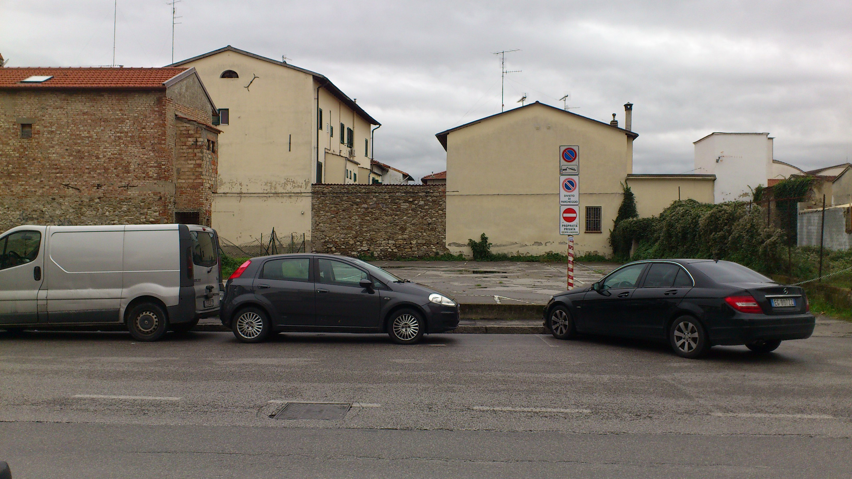 Piazza 5 Marzo Vista generale